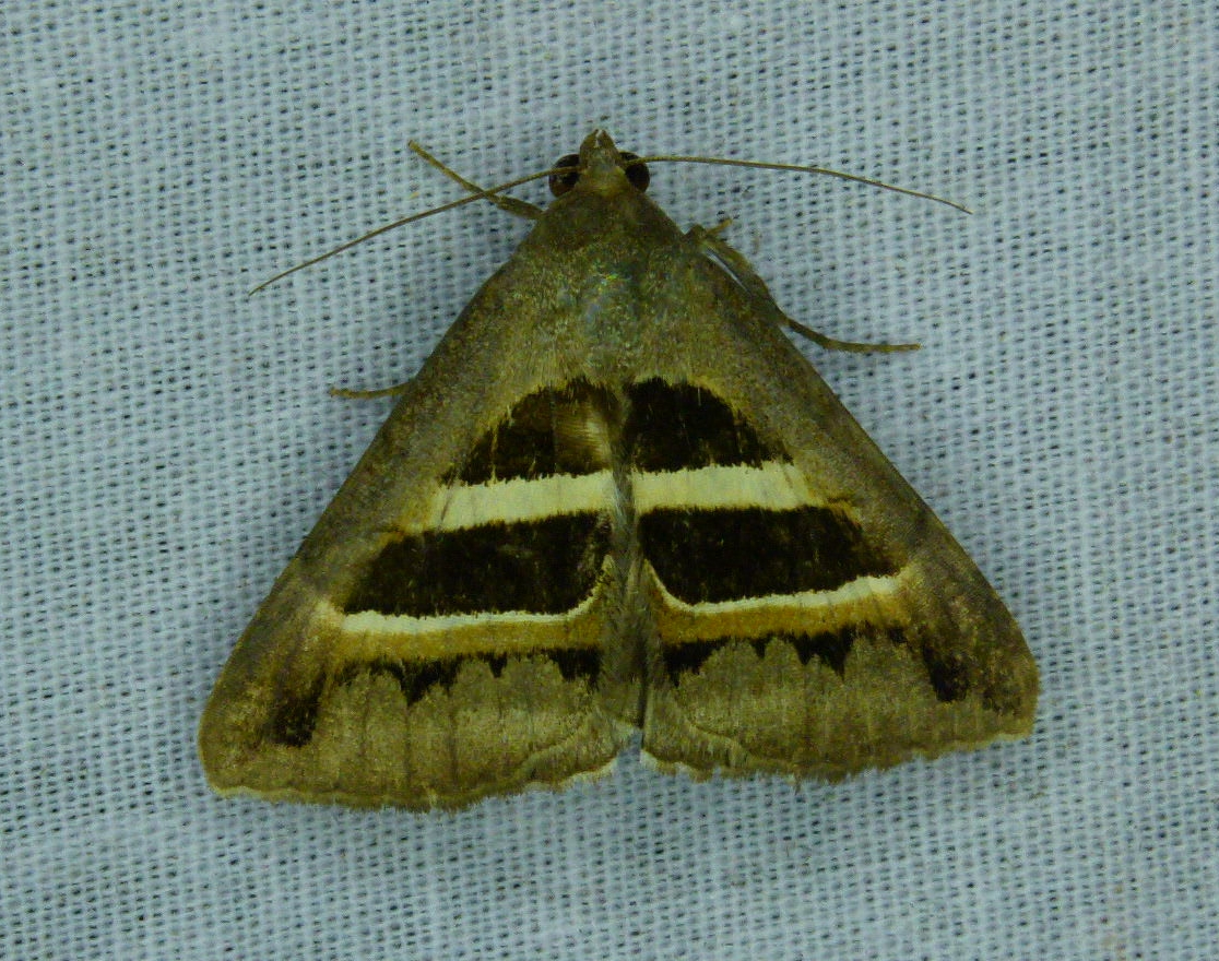 Grammodes geometrica. Mudigere, India